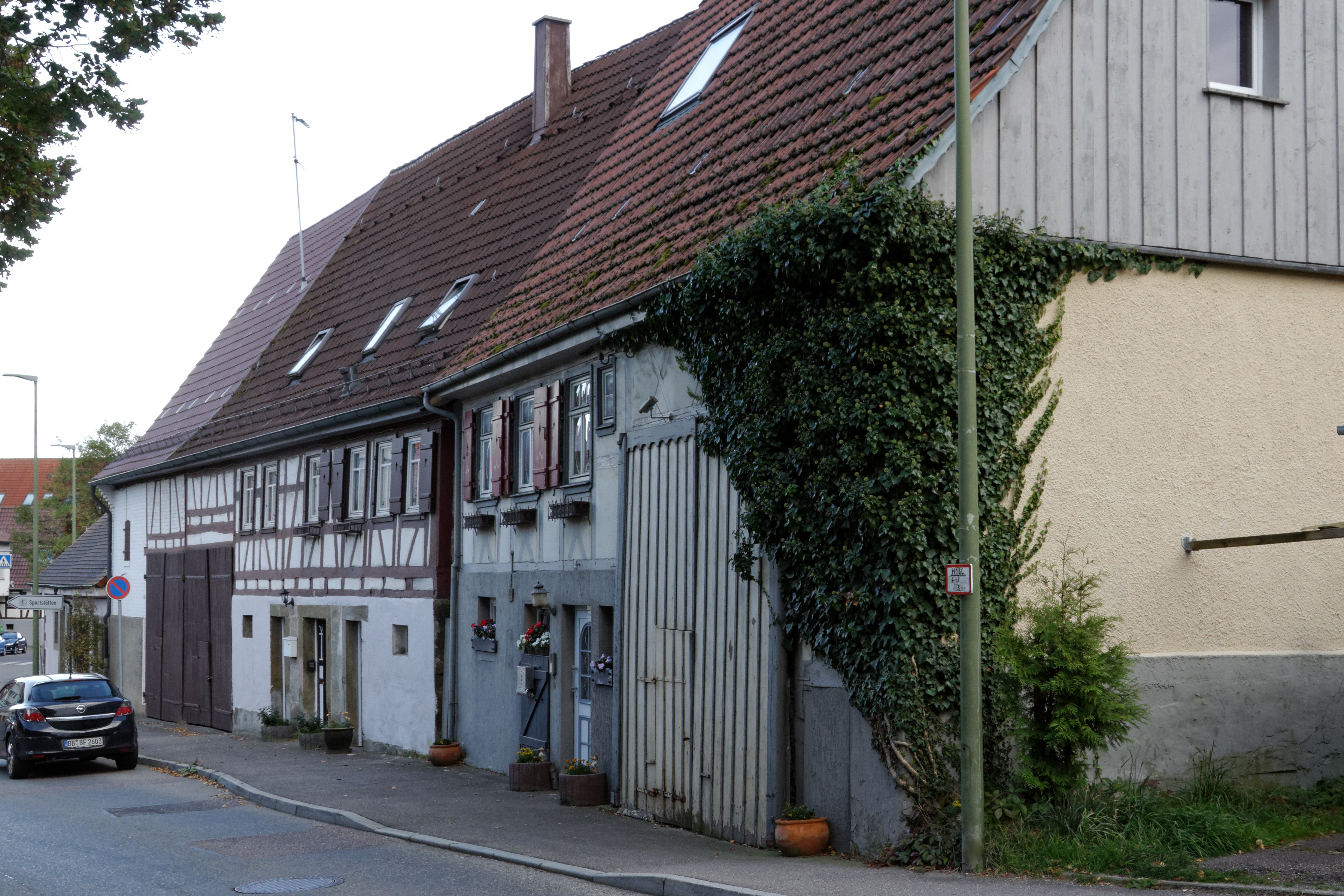 Fachwerkensemble in Gebersheim, Stadtteil von Leonberg (Baden-Württemberg).